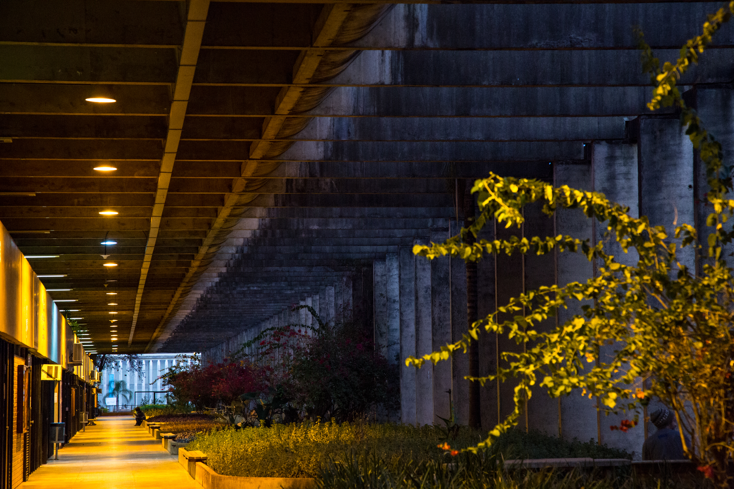 Brasília, 18 de Julho de 2018. Imagens do cair da noite revelam a iluminação no campus Darcy Ribeiro. Foto: Beto Monteiro / Secom UnB. ATENÇÃO – As informações, as fotos e os textos podem ser usados e reproduzidos, integral ou parcialmente, desde que a fonte seja devidamente citada e que não haja alteração de sentido em seus conteúdos. Crédito para textos: nome do repórter/Secom UnB ou Secom UnB. Crédito para fotos: nome do fotógrafo/Secom UnB.